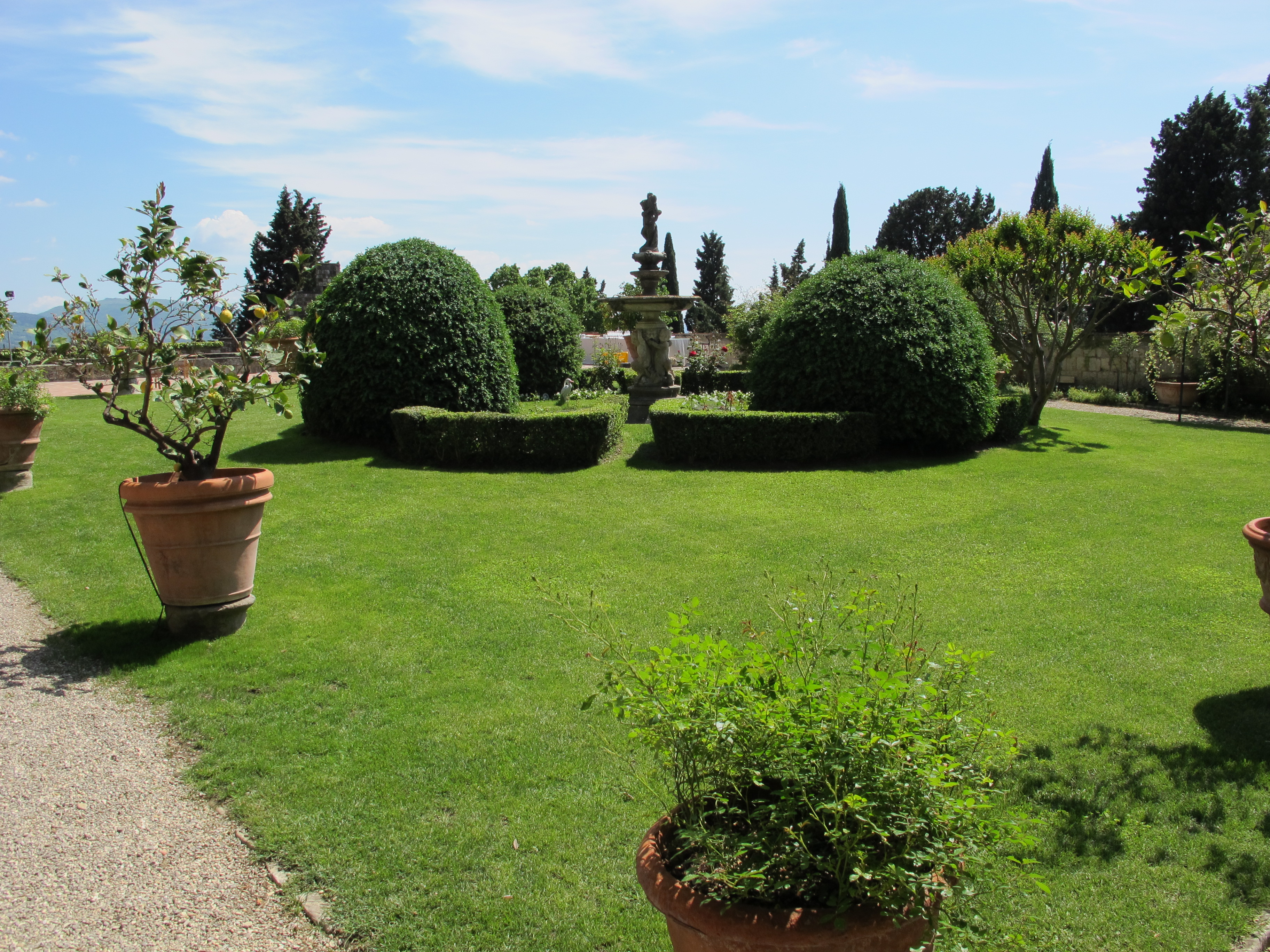 Castello di vincigliata, giardino